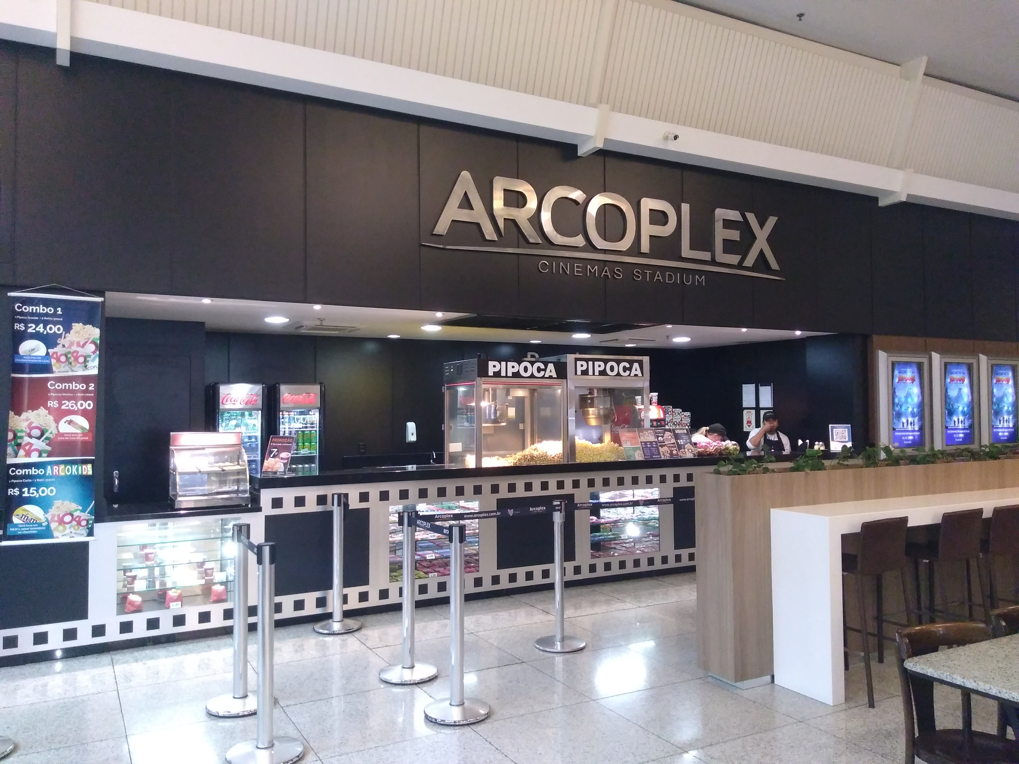 Fachada do Arcoplex Boulevard Assis Brasil de Porto Alegre, RS